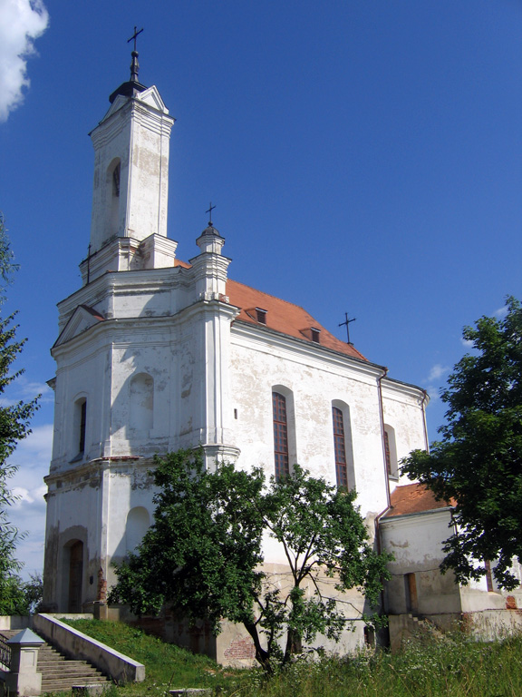 Kościół Narodzenia NMP w Zasławiu. костел Рождества Девы Марии в Заславле